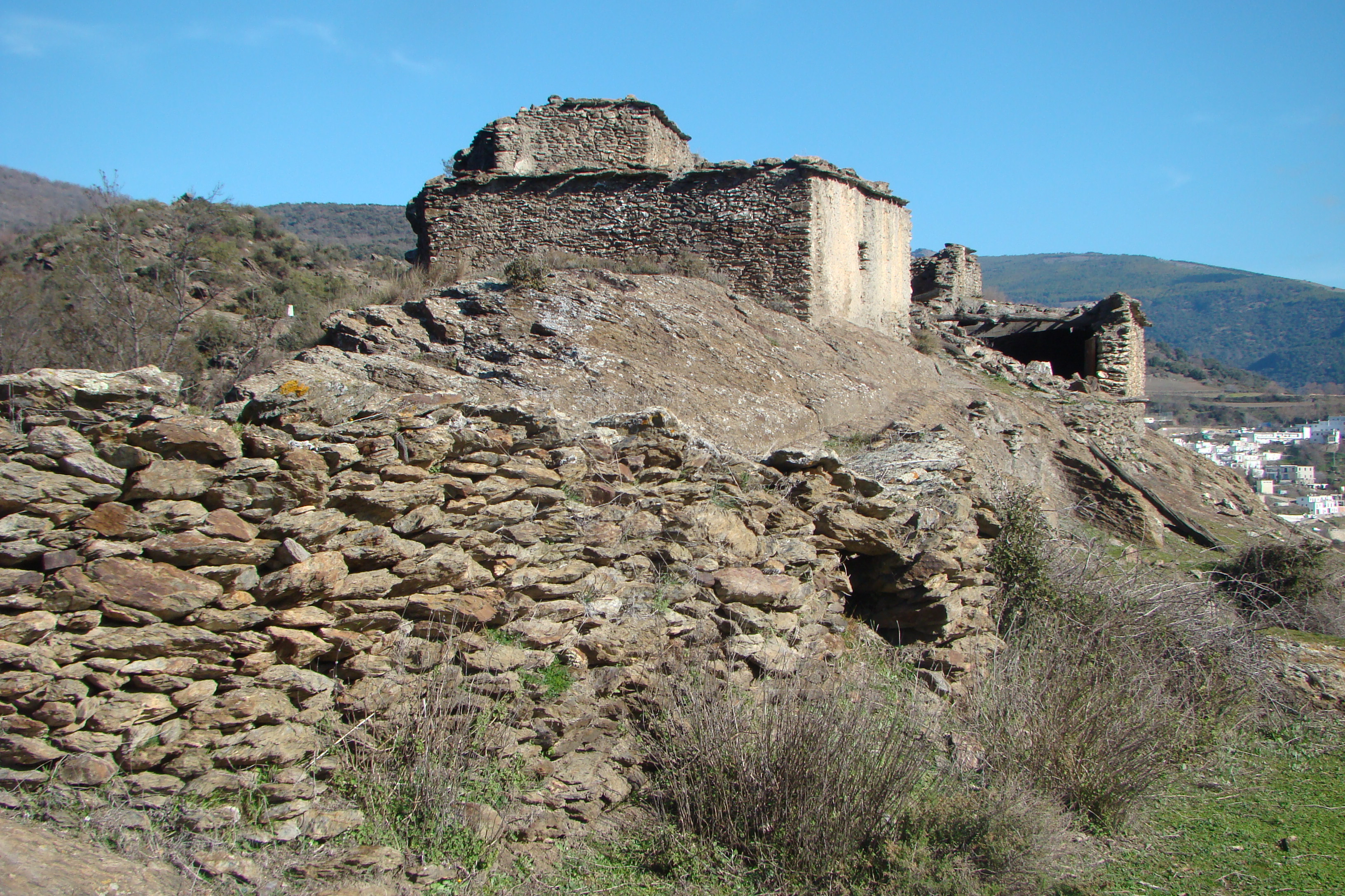 Vista del cortijo construido sobre los restos del asentamiento mozárabe en Busquístar (Granada, España)